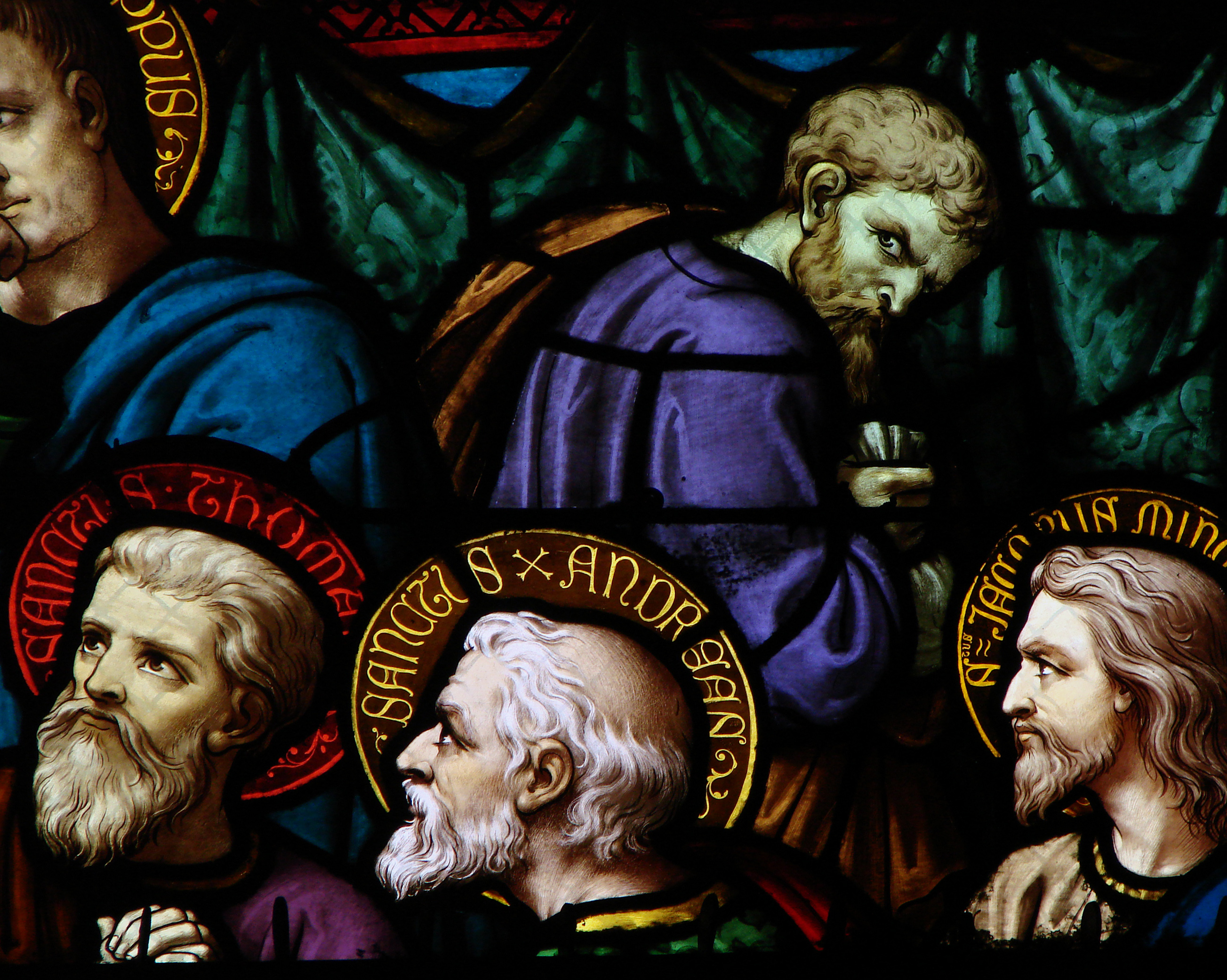 Basilique-cathédrale Notre-Dame de l'Annonciation de Moulins; vitrail néogothique du XIXe siècle. La Cène. Détail: Judas.